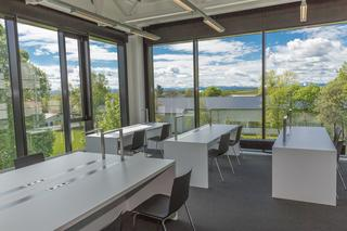 Lern- und Arbeitsplätze der UBUniBWM.